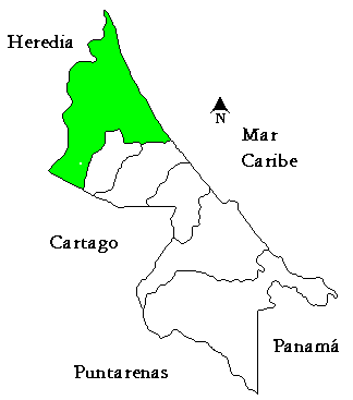 Mapa del cantón de Pococí, provincia de Limón, Costa Rica